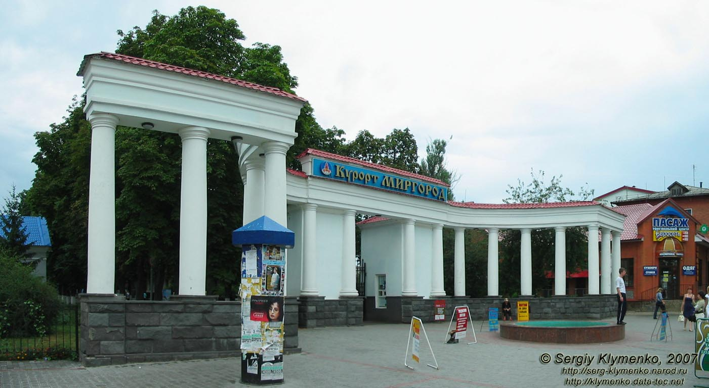 Центральний вхід у Миргородкурорт, Миргород (Полтавська область), 2007